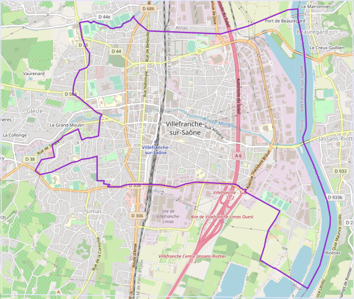 carte réalisée sur umap This map may be incomplete, and may contain errors. Don't rely solely on it for navigation.